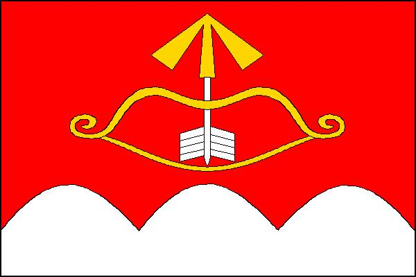 Vlajka obce Stříbrné Hory (okres Havlíčkův Brod)